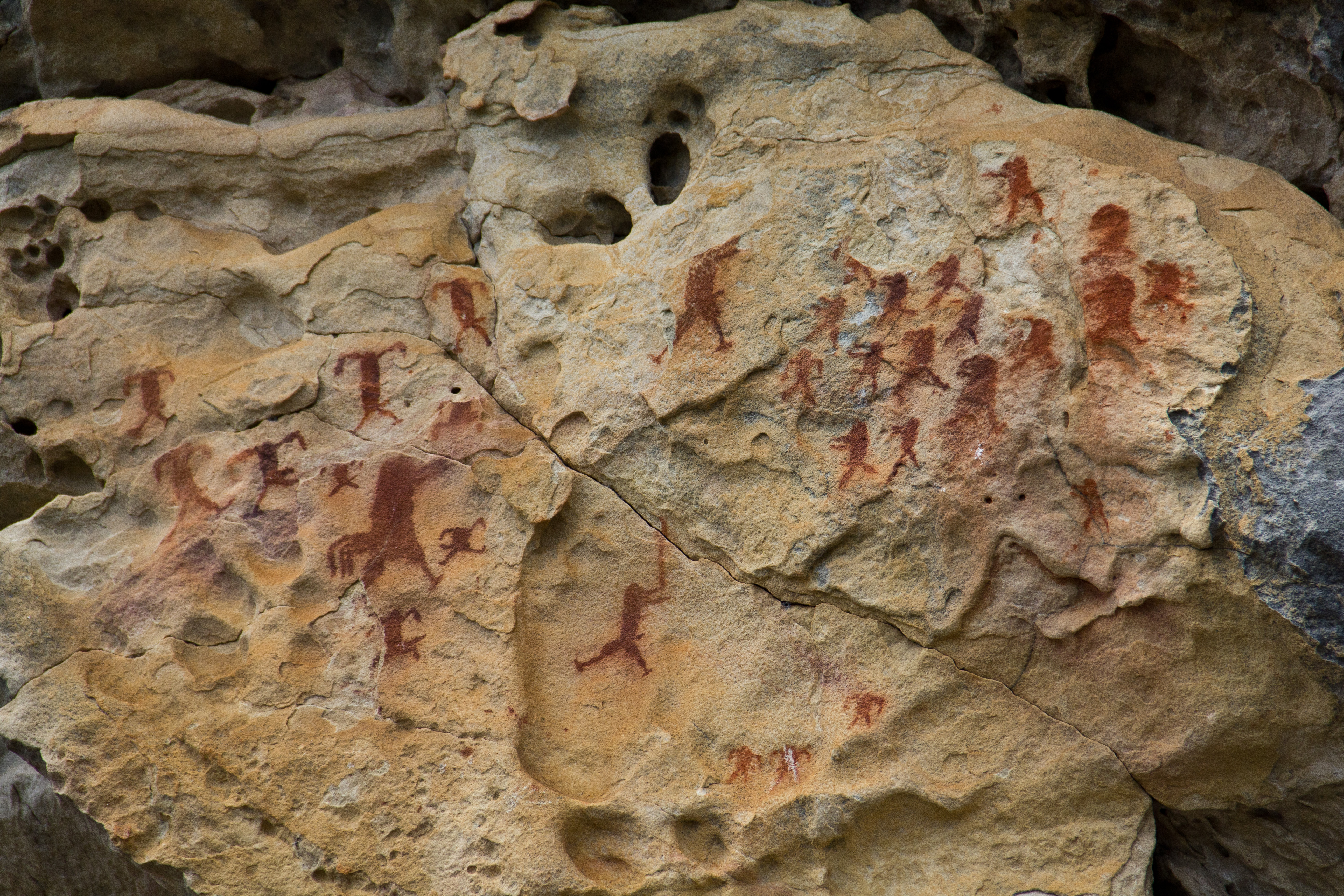 Pinturas Rupestres - Parque Nacional do Catimbau - Pernambuco - Brasil